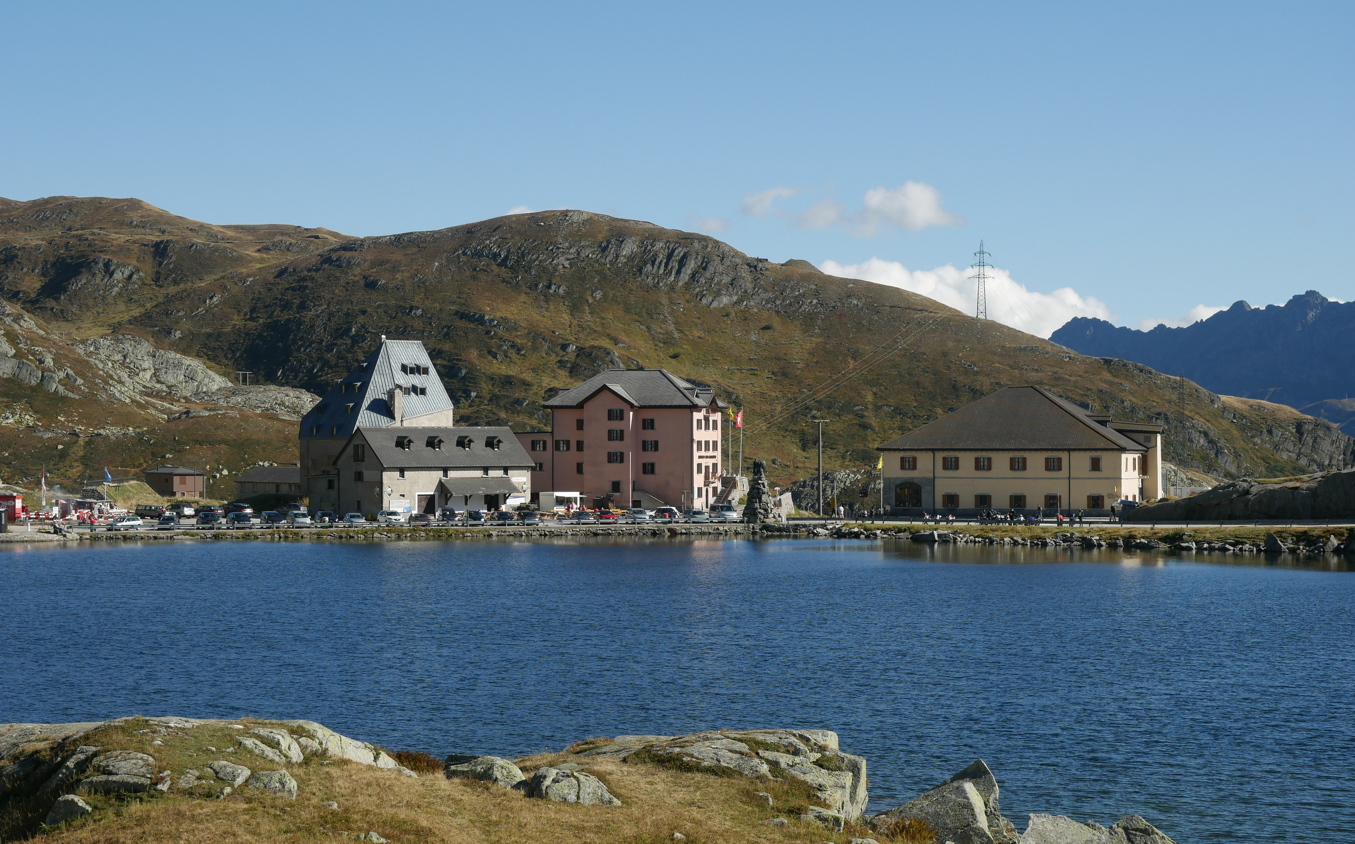 Gotthardpass, See mit Hospiz und Poststation